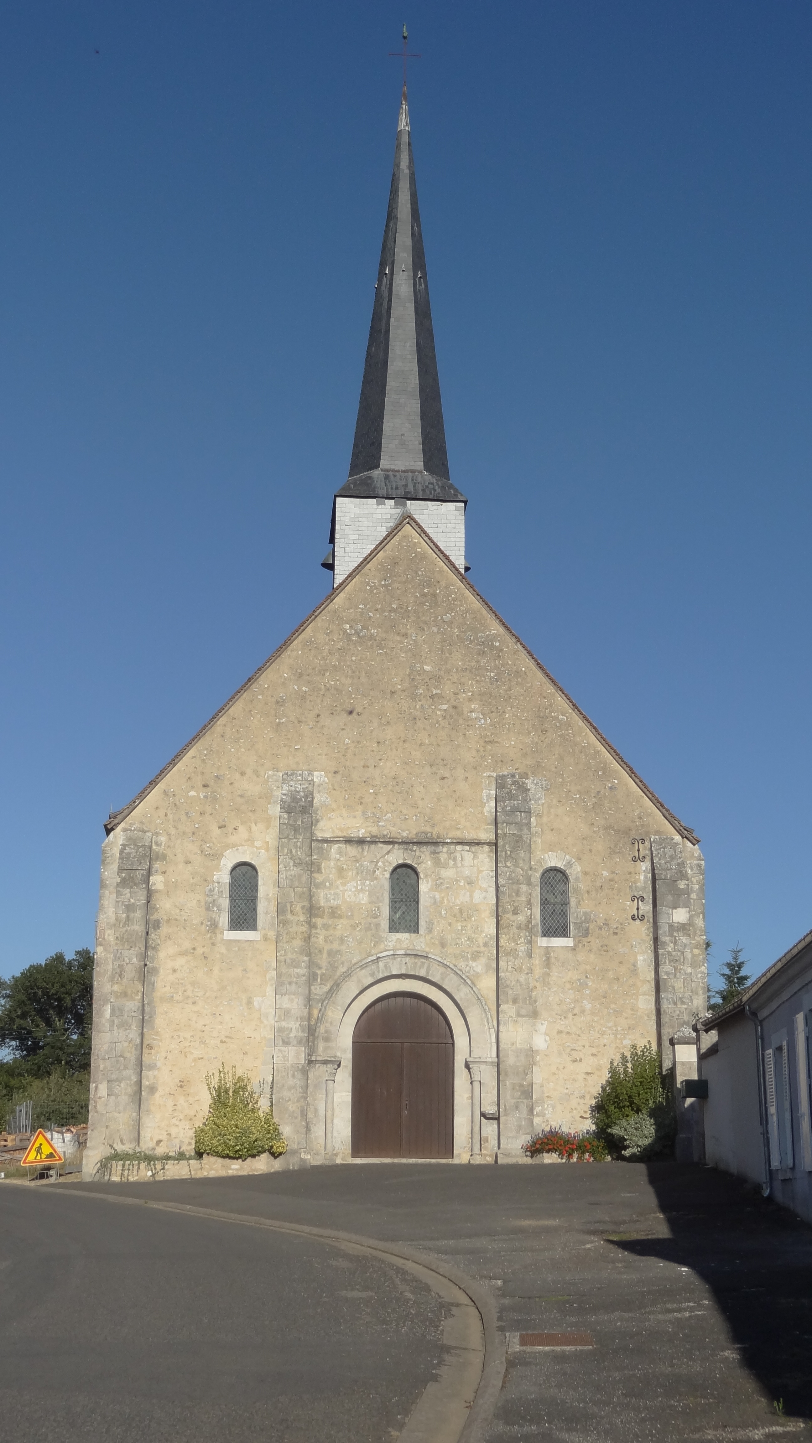 Église Saint-Pierre de Vievy-le-Rayé, Loire-et-Cher, France .